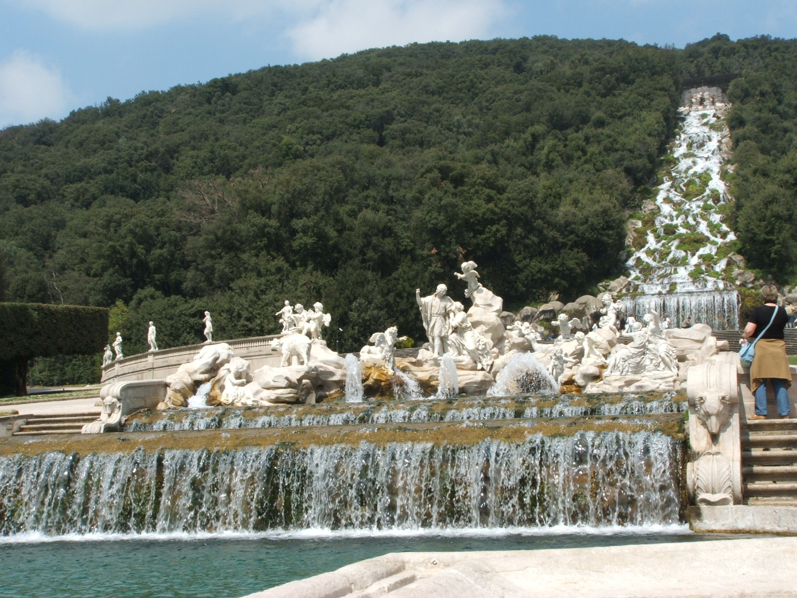 Immagine dalla Reggia di Caserta, Caserta, Campania, Italia. Statue e fontane nel parco